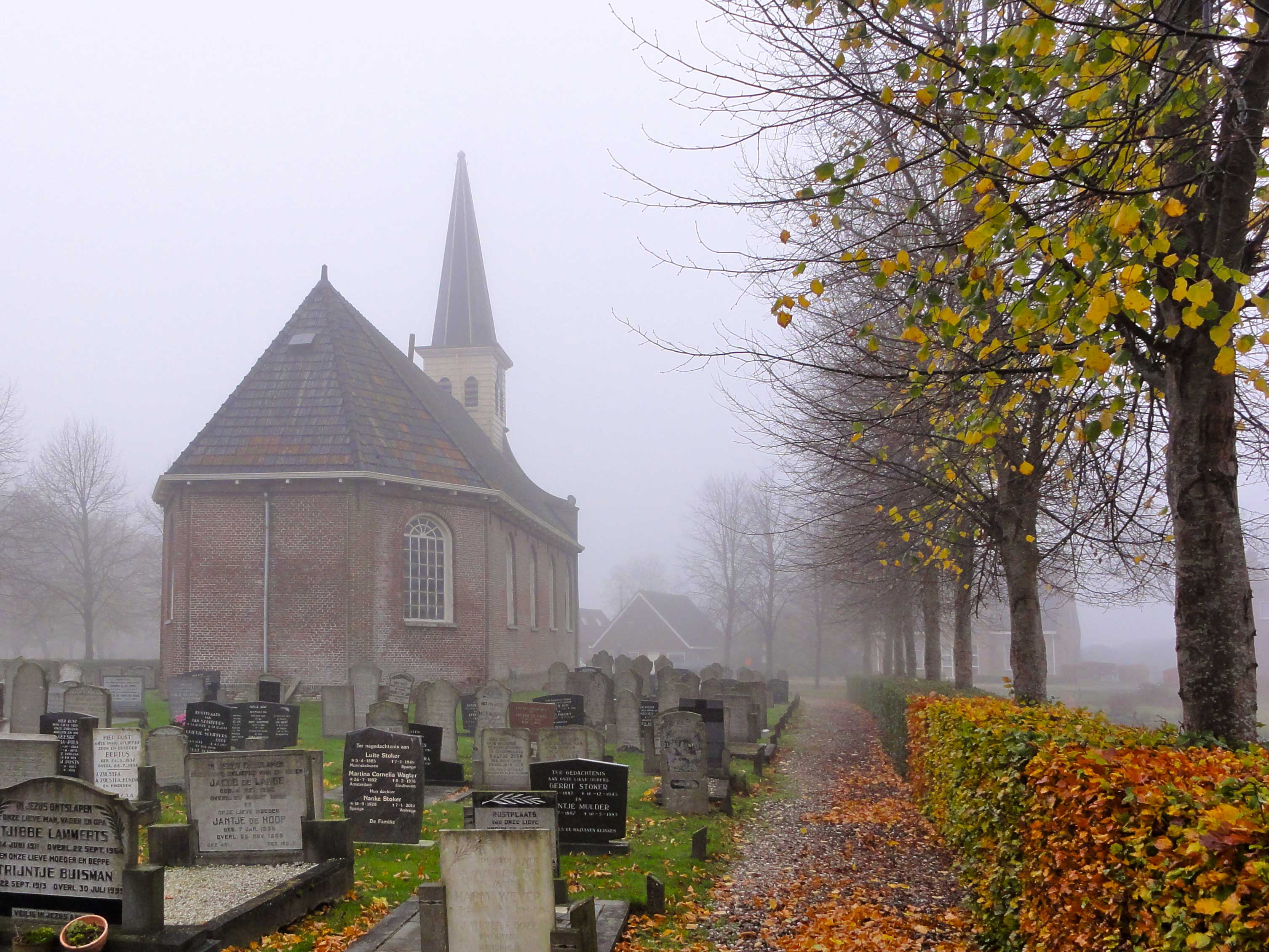 Kerk van Munnekeburen